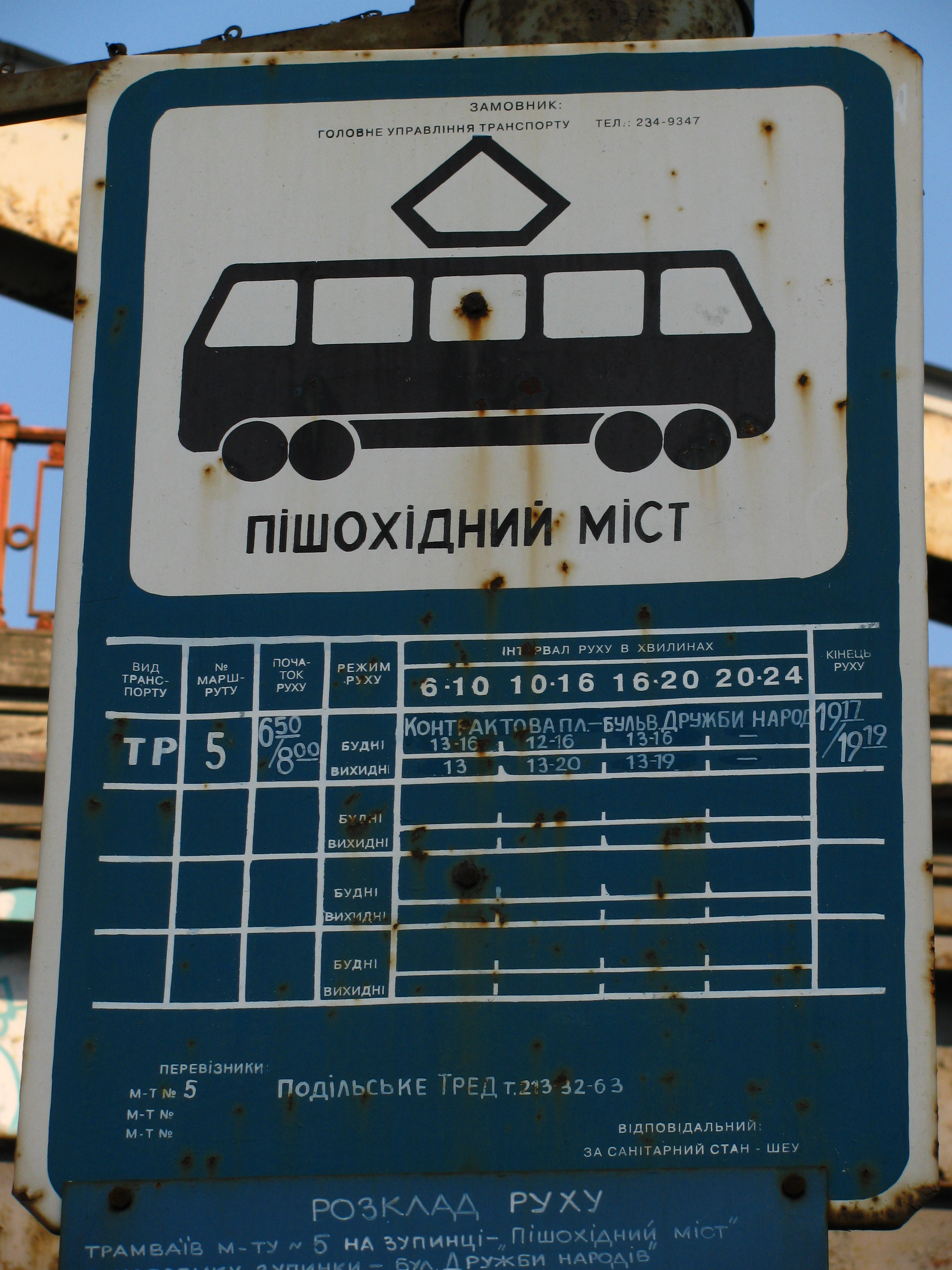 Знак трамвайної зупинки Київ.jpg